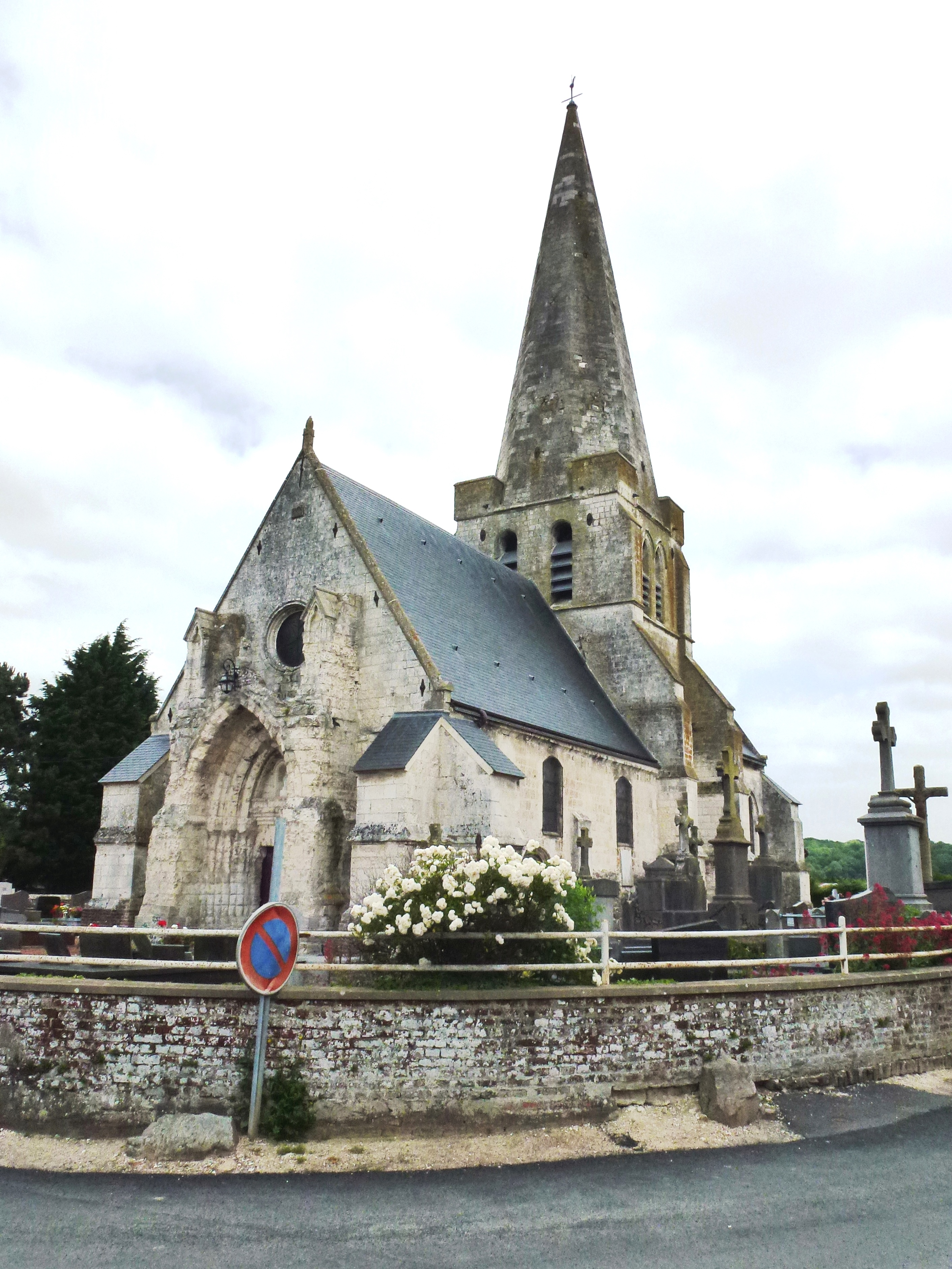 Mazinghem (Pas-de-Calais) église Notre-Dame-de-l'Annonciation PA00108344 .